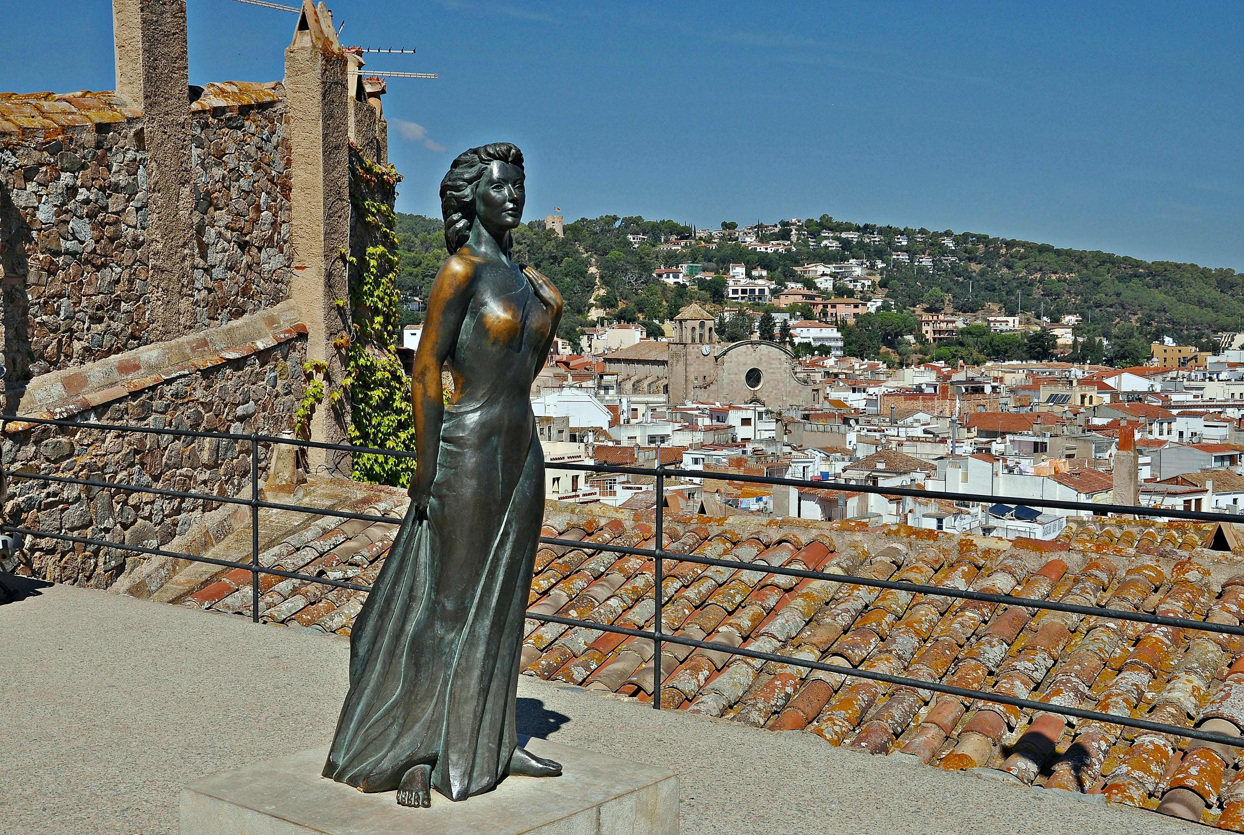 la selva-Cataluña